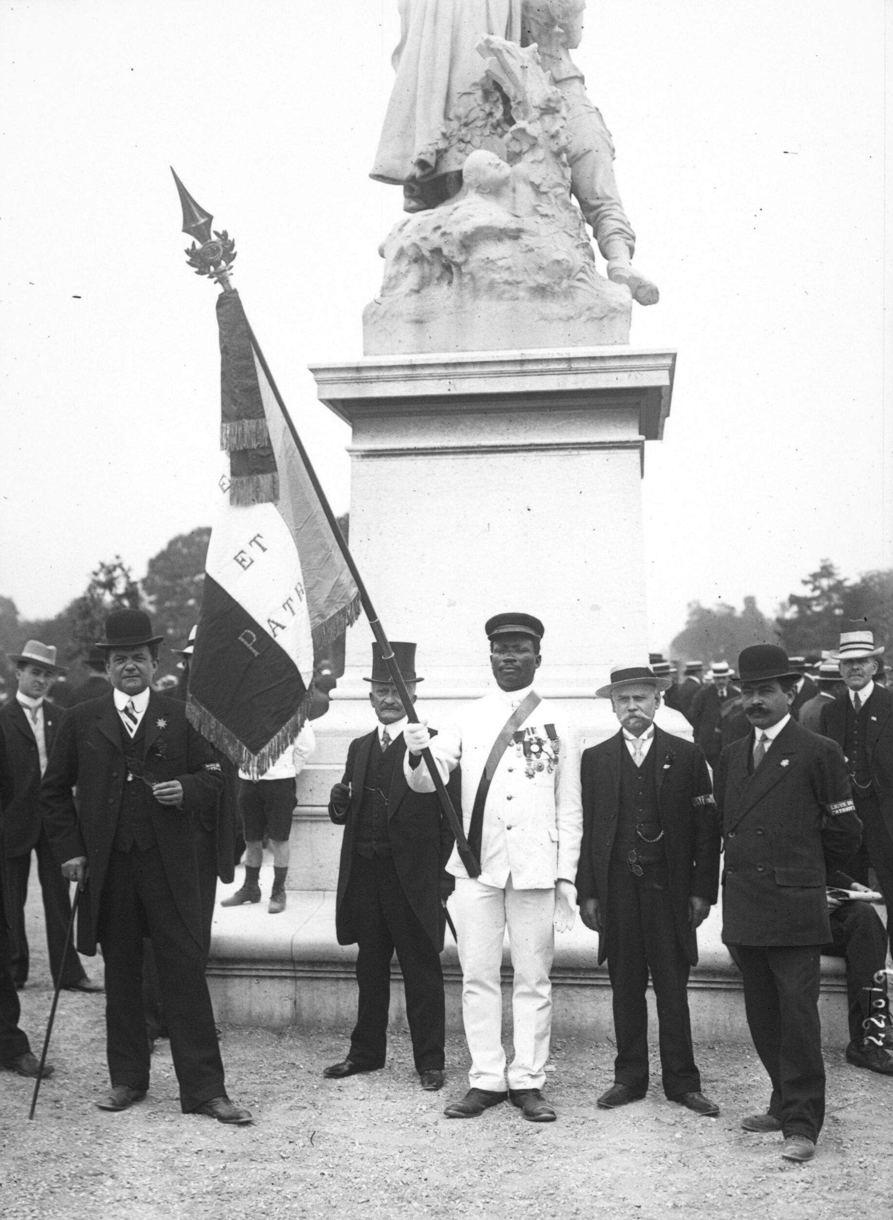 Manifestation de la Ligue des patriotes le 14 juillet 1912 (devant le piédestal du monument Quand même).